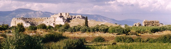 Das große Theater von Milet durch die Felder hindurch fotografiert. Auf dem obersten Rang ist das byzantinische Kastell zu erkennen. Am rechten Bildrand aufgehendes Mauerwerk der Faustina-Thermen. Im Hintergrund das Gebirge mit dem antiken Namen Mykale. 2003 fotografiert durch I. Panteleon.